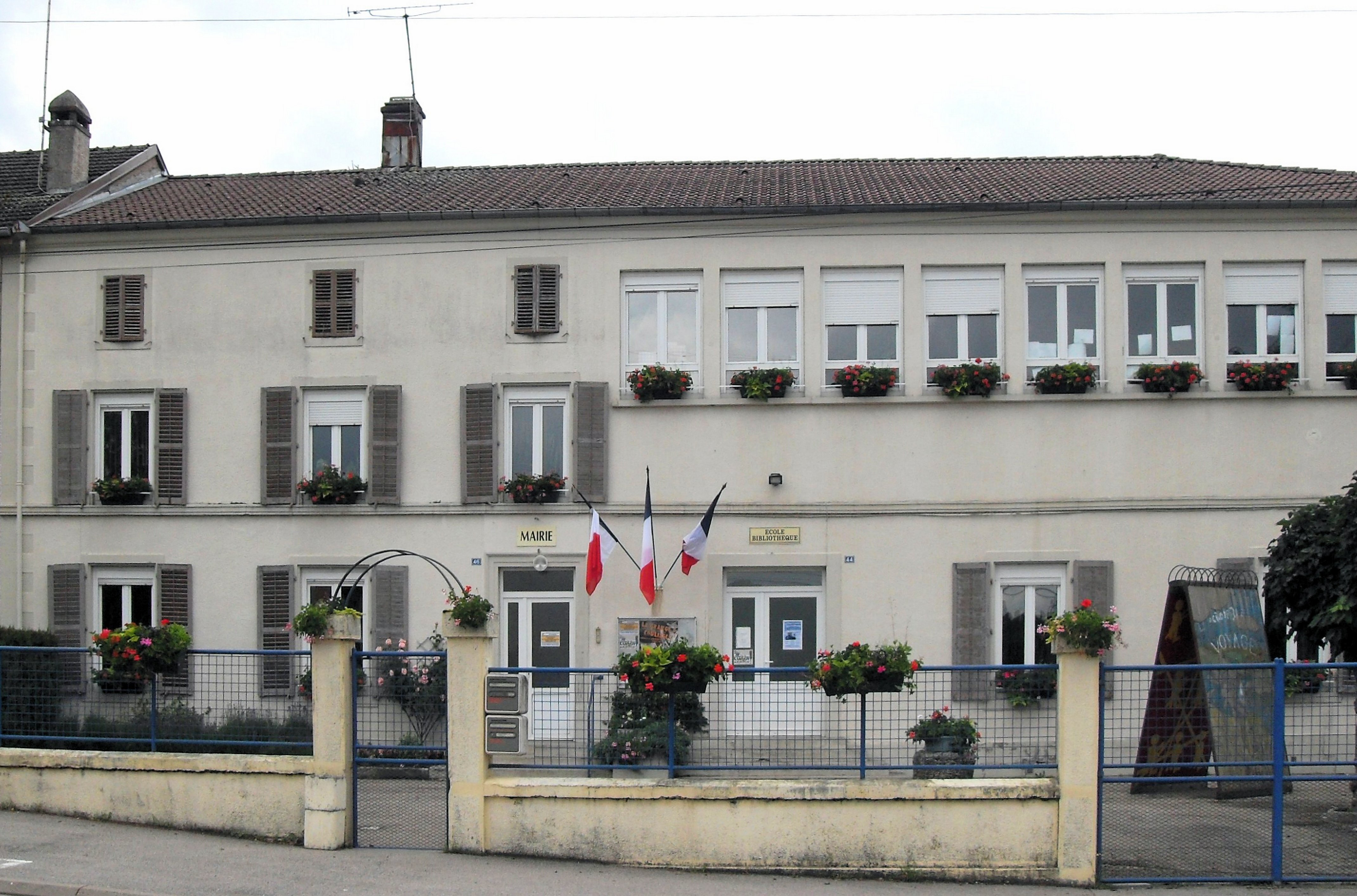 La mairie-école de Madonne-et-Lamerey